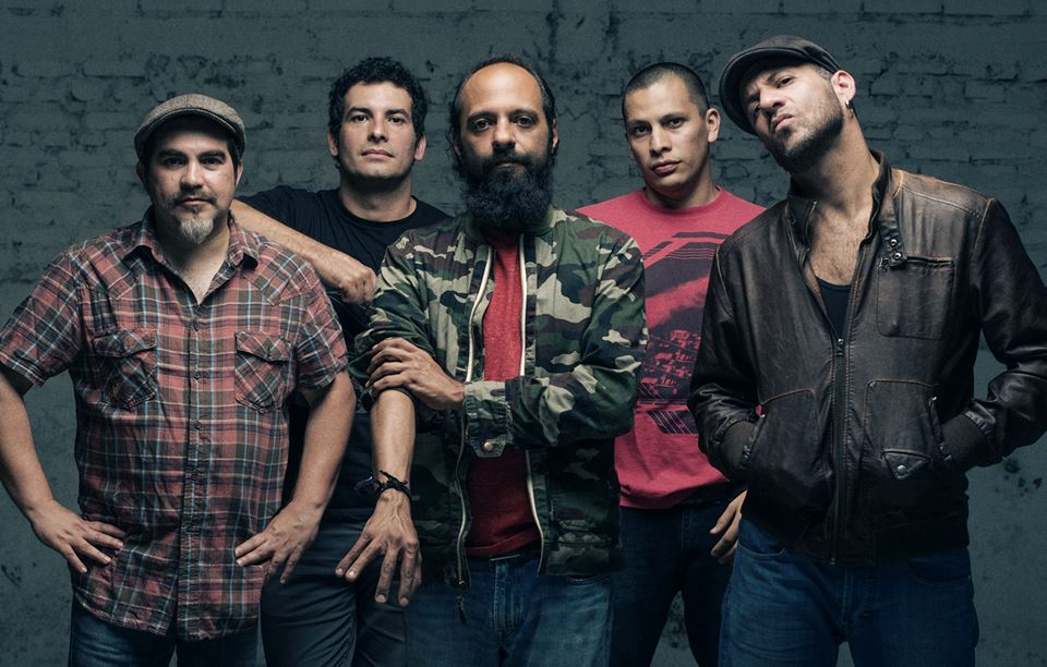 Bohemia Suburbana 2014